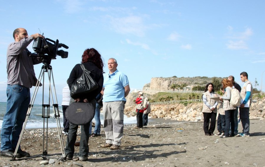 Ejercicio para televisión. Playa de la Araña, en Málaga (España), 5 de marzo de 2011